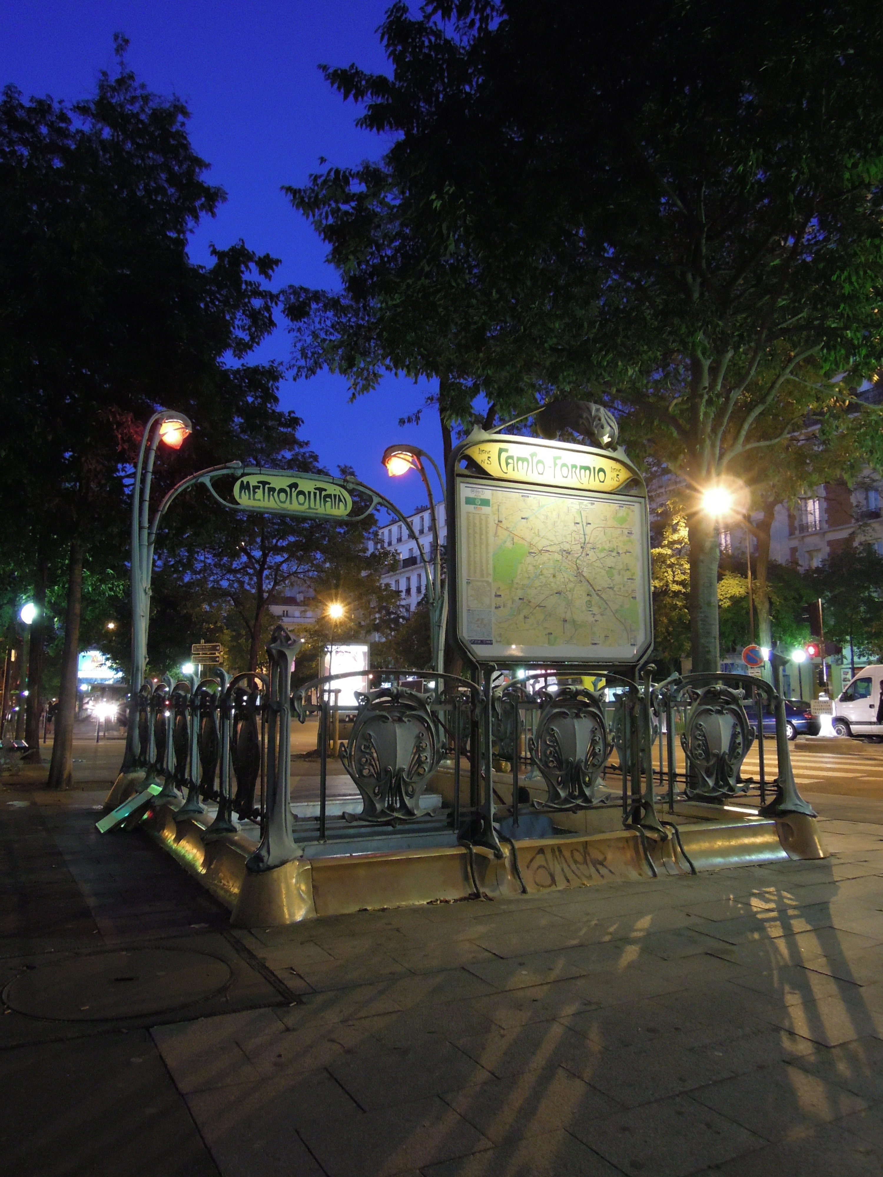 Édicule Guimard de la station de métro Campo-Formio, Boulevard de l'Hôpital (Inscrit, 1978) .